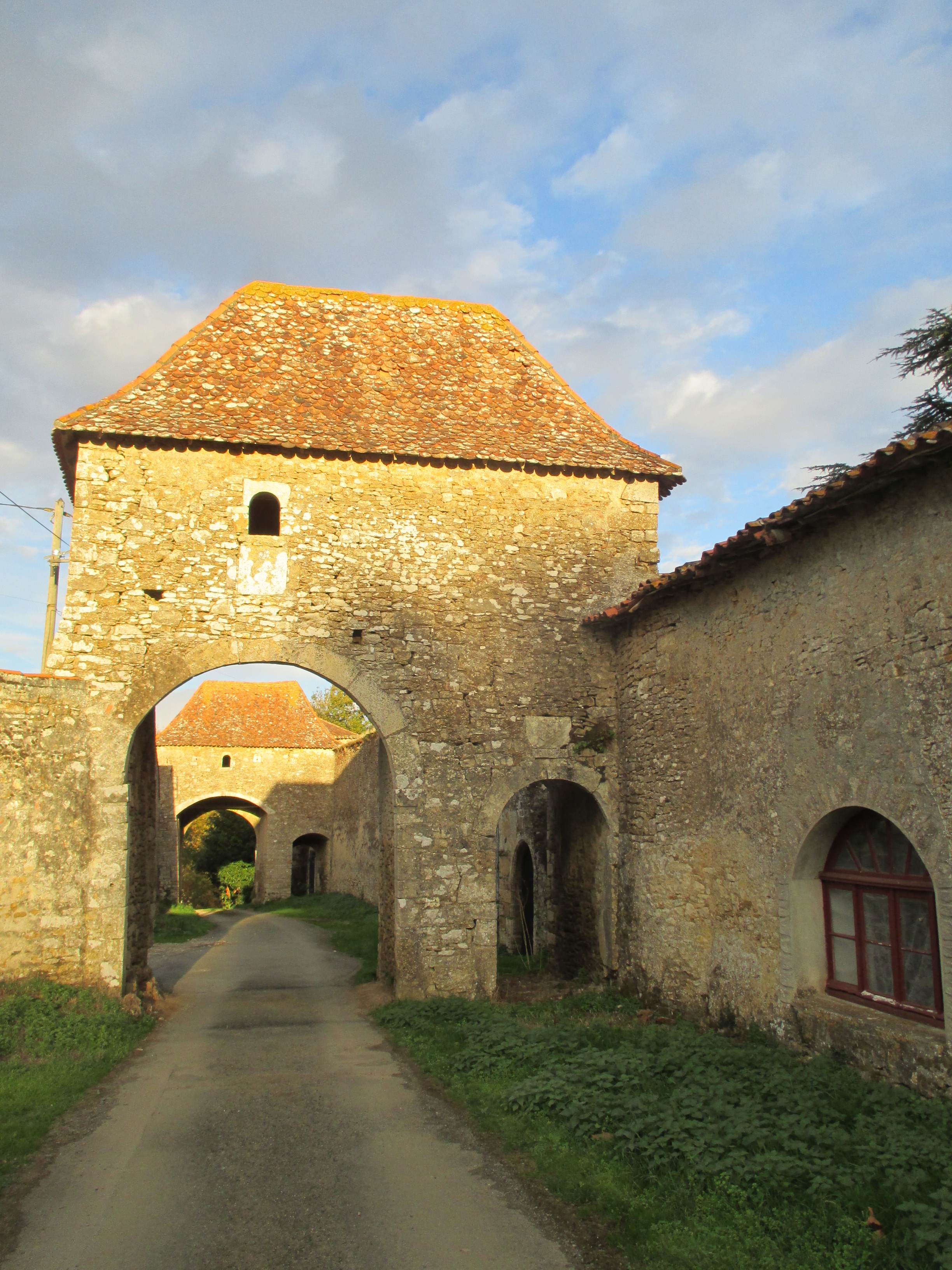 Allé du manoir de ponsay